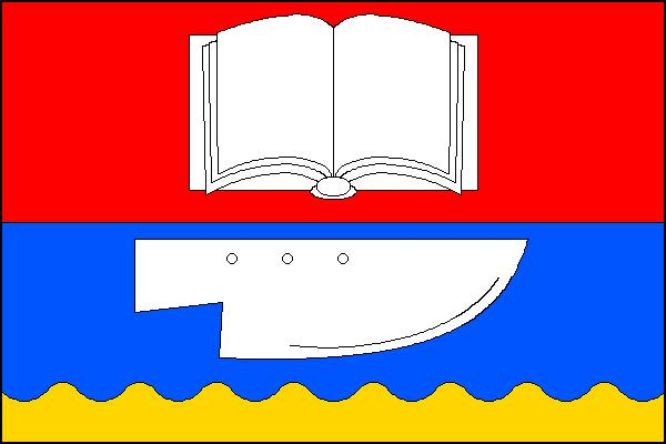 Vlajka obce Štěpánovice v okrese Brno-venkov